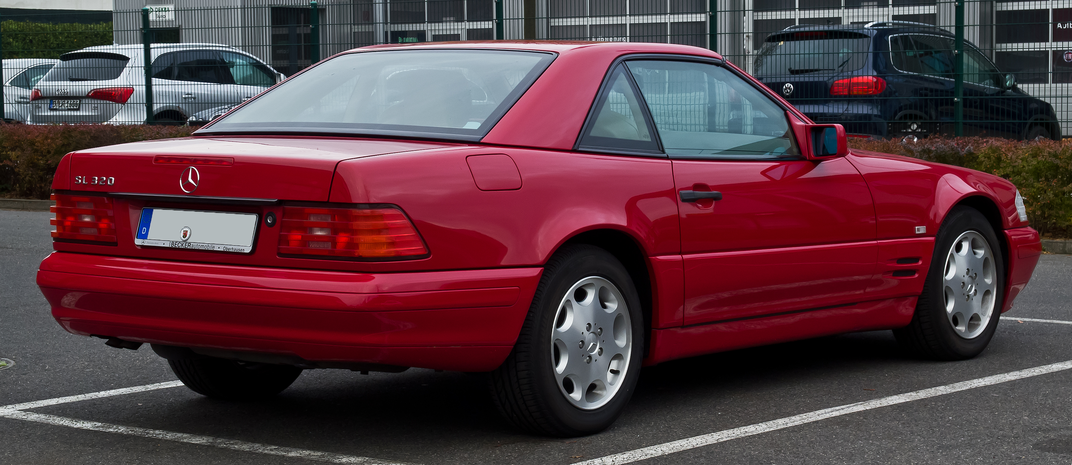 Mercedes-Benz SL 320 (R 129, 1. Facelift)